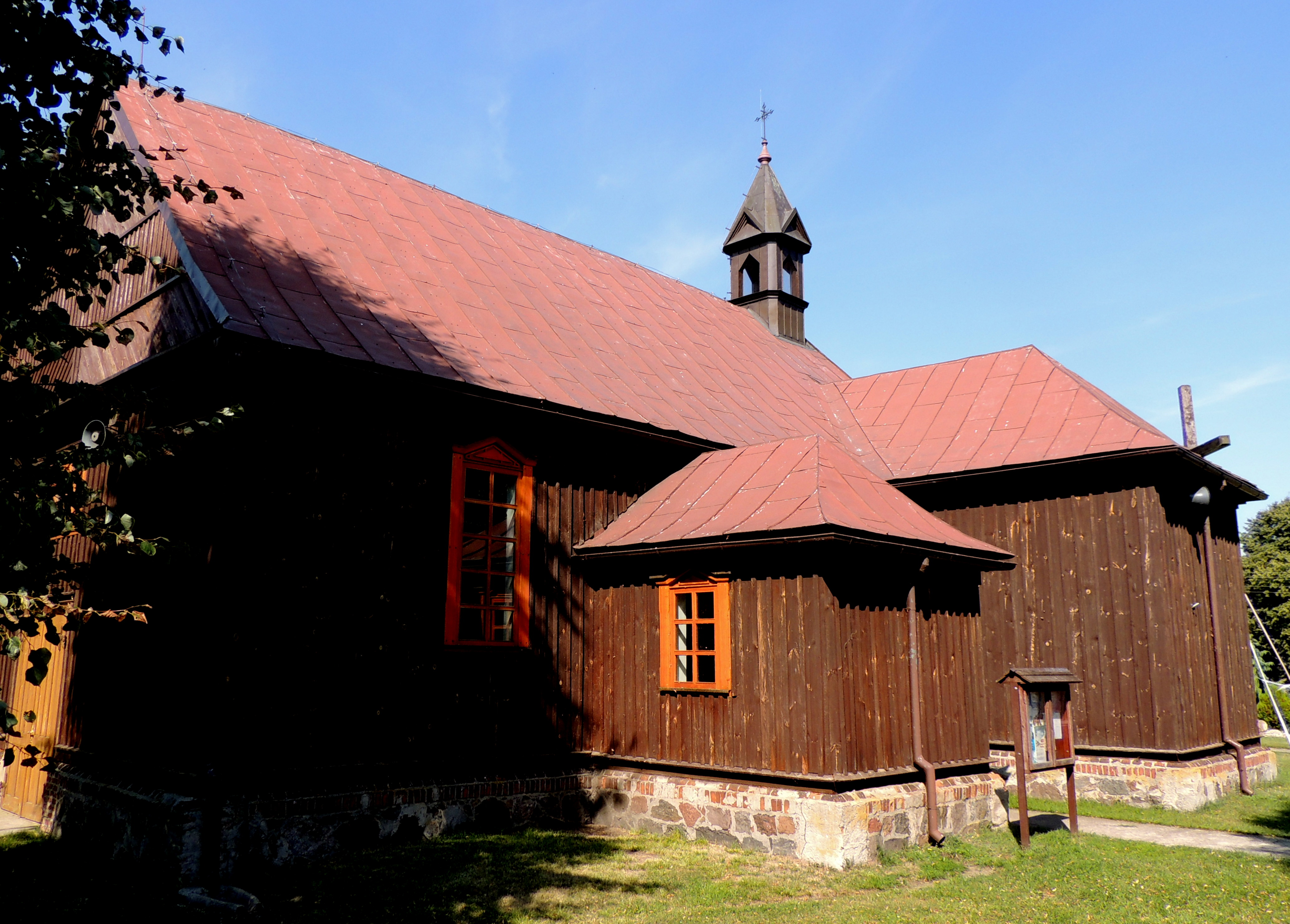 Brodnia 92, kościół św. Stanisława Biskupa, XVIII